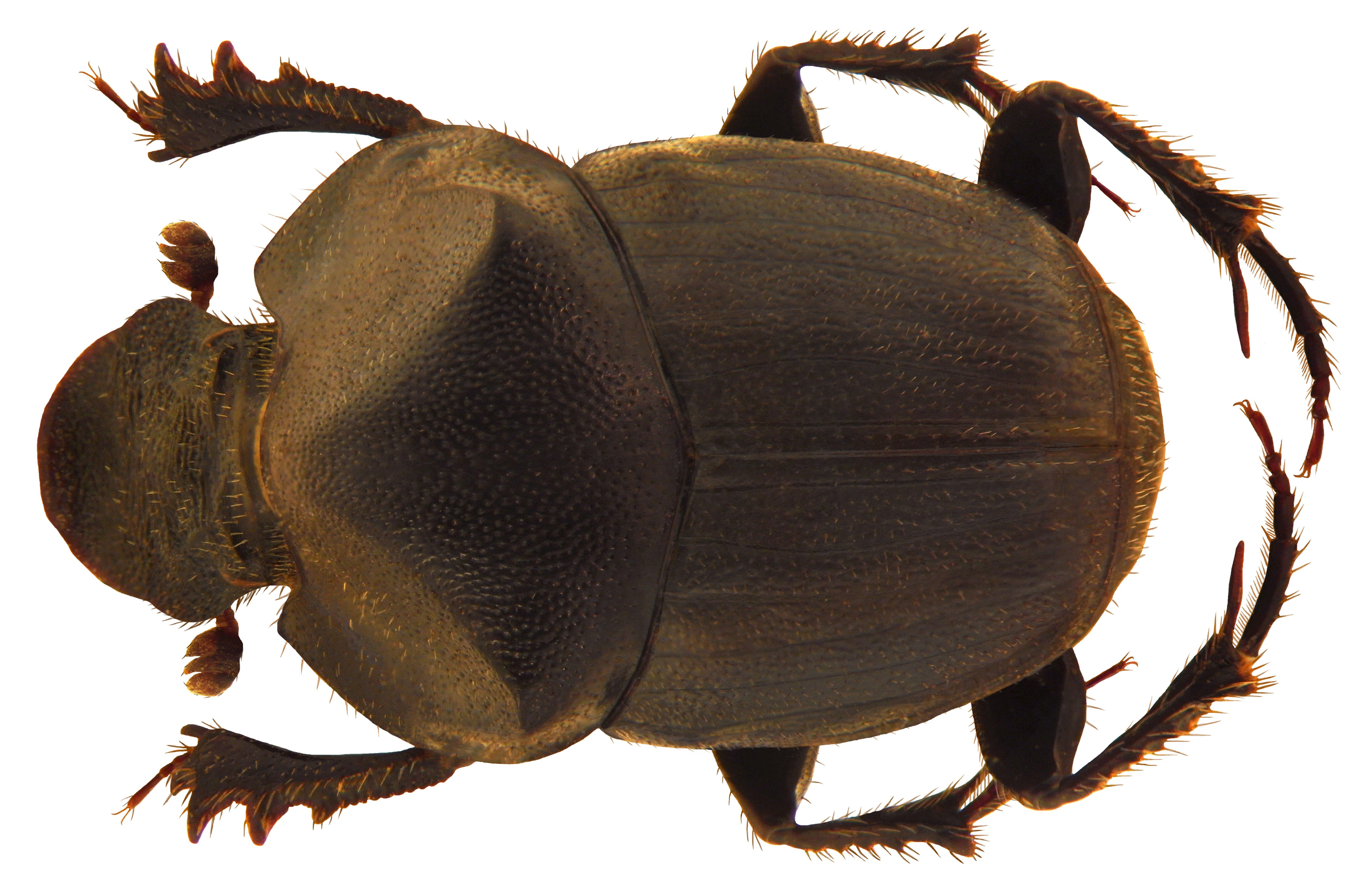 Familie: Scarabaeidae Groesse: 10,0 mm Fundort: China, Kuatun, Fukien leg. Tschung-Sen, 1946; det. J.Scheuern, 1994 Photo: U.Schmidt, 2010